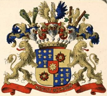 Ungern-Sternbergi suguvõsa krahvivapp